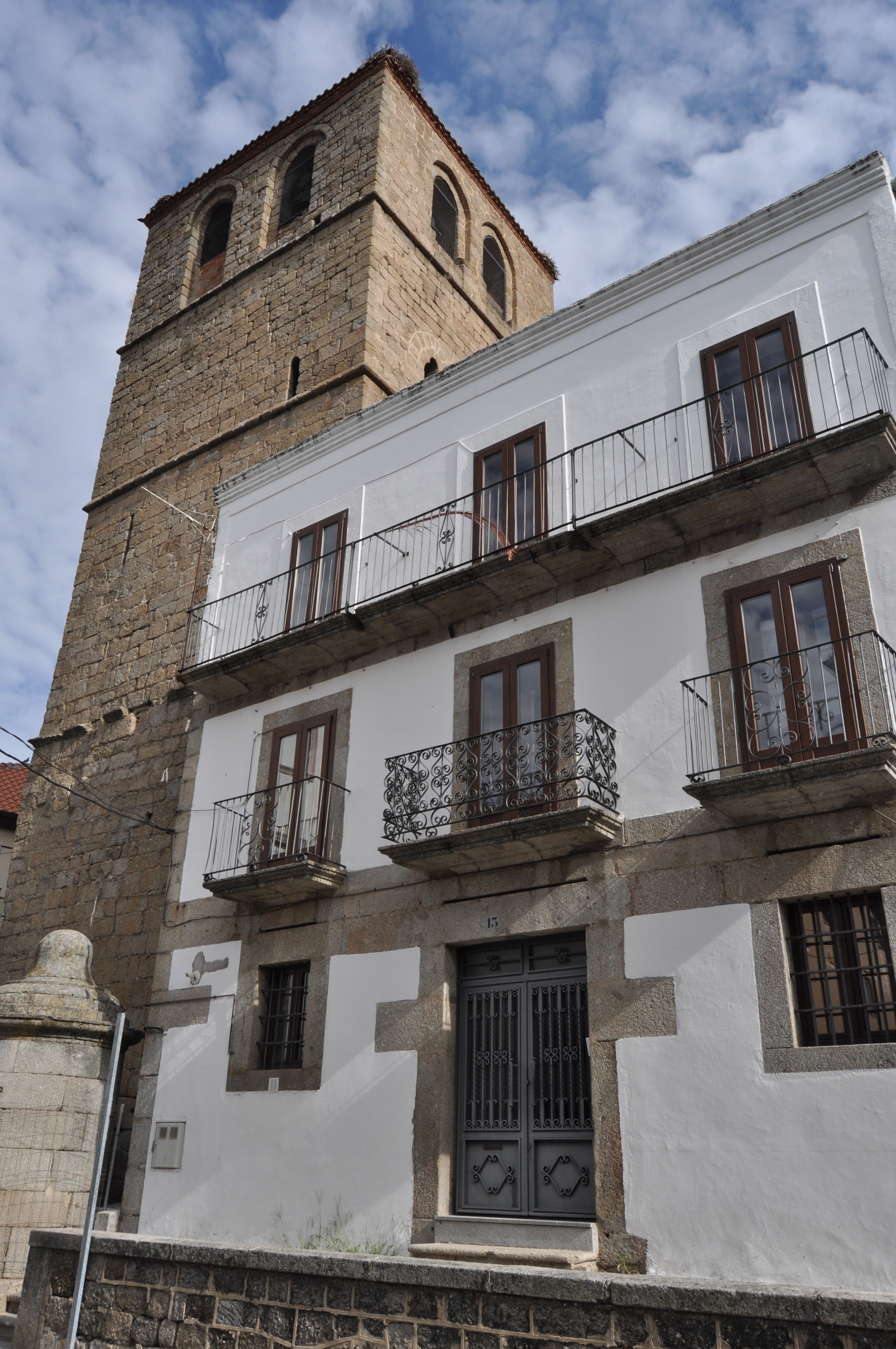 Bejar - 004